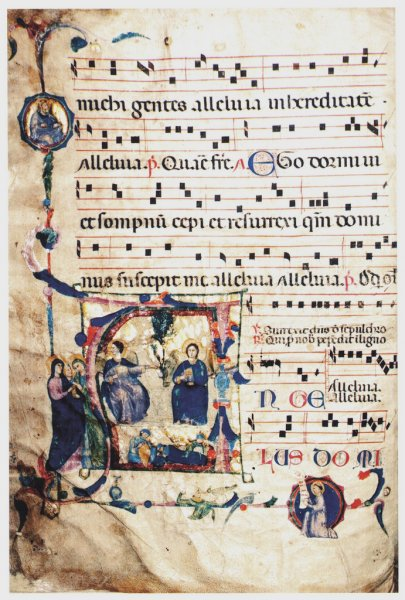 Neri da Rimini Antifonario, c. 1310-1312 Archivio Capitolare, Faenza